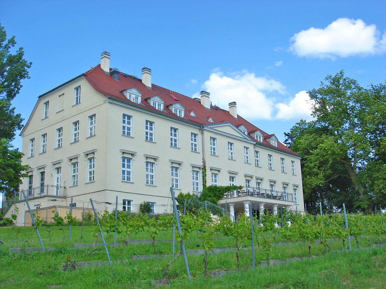 Schloss Rattey in Schönbeck nahe Neubrandenburg, Landkreis Mecklenburgische Seenplatte, Mecklenburg-Vorpommern. Das klassizistische Schloss von 1806 ist berühmt für die Weingüter ringsum. Geschichtl. Abriss: Im Jahr 1690 verlieh Gustav Adolf Herzog von Mecklenburg-Güstrow den Besitz an Georg-Henning von Oertzen. Die Familie konnte den Besitz aber erst ab 1775 nach dem Erlöschen der Familie Manteuffel im männlichen Stamm für sich nutzen. In diesem Jahr übernahm Victor-Wilhelm von Oertzen den Besitz. Sein Sohn, Hans-Christoph von Oertzen ließ 1806 das Herrenhaus, einen zweigeschossigen Putzbau im klassizistischen Stil, auf den Fundamenten eines älteren Gebäudes, errichten. Das Herrenhaus Rattey wurde zum Ende des 2. Weltkrieges durch die Familie von Oertzen an die Gemeinde verkauft. Die Familie verließ Mecklenburg nach dem gescheiterten Hitler-Attentat, an dem Hans-Ulrich von Oertzen maßgeblich beteiligt war. Nach dem Krieg zogen vorerst Flüchtlinge in das Gebäude ein, später wurden die Räume auch durch einen Kindergarten, die Post und die LPG-Küche genutzt. Im Jahr 1996 erwarben zwei Bremer Unternehmer das Herrenhaus und renovierten es von Grund auf. Seit 1998 wird hier ein Hotel geführt. Bekannt wurde Rattey auch als nördlichstes Weinanbaugebiet Deutschlands. Im Park stehen 13 Eichen, deren Alter auf mindestens 700 Jahre geschätzt wird. (gutshaeuser.de)